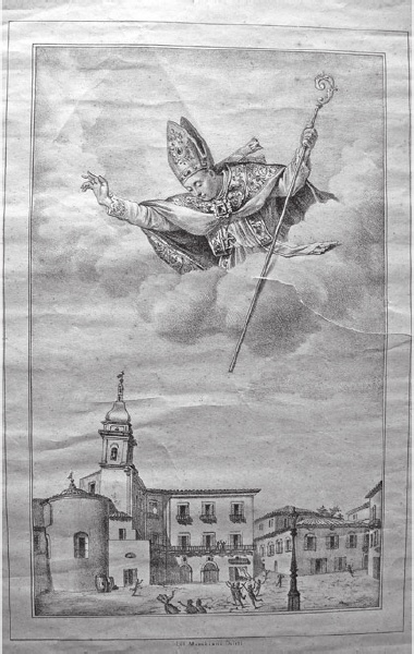 Litografia di un’opera che rappresenta Emidio di Ascoli sopra la città di Chieti durante il terremoto di Orsogna del 1881